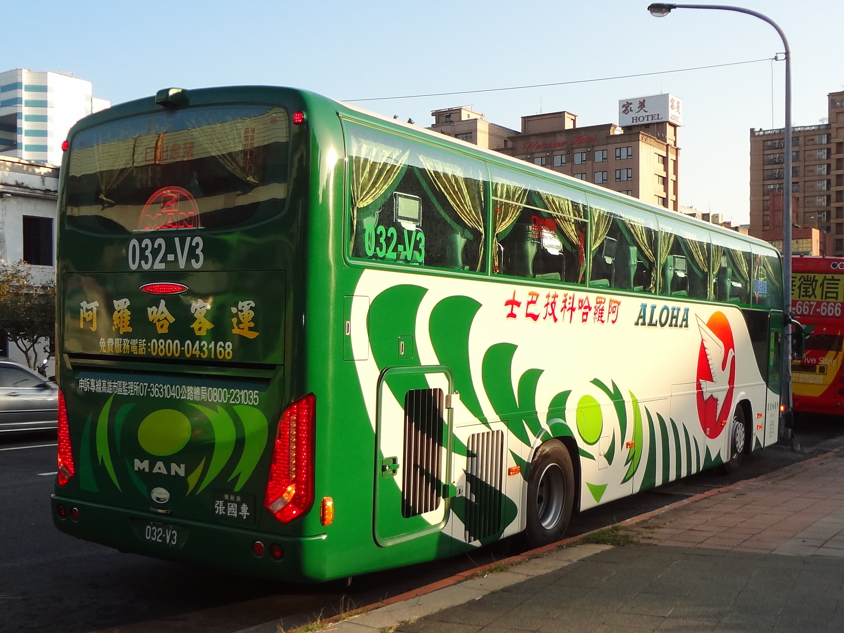 阿羅哈客運MAN 19.400HOCL大客車032-V3。